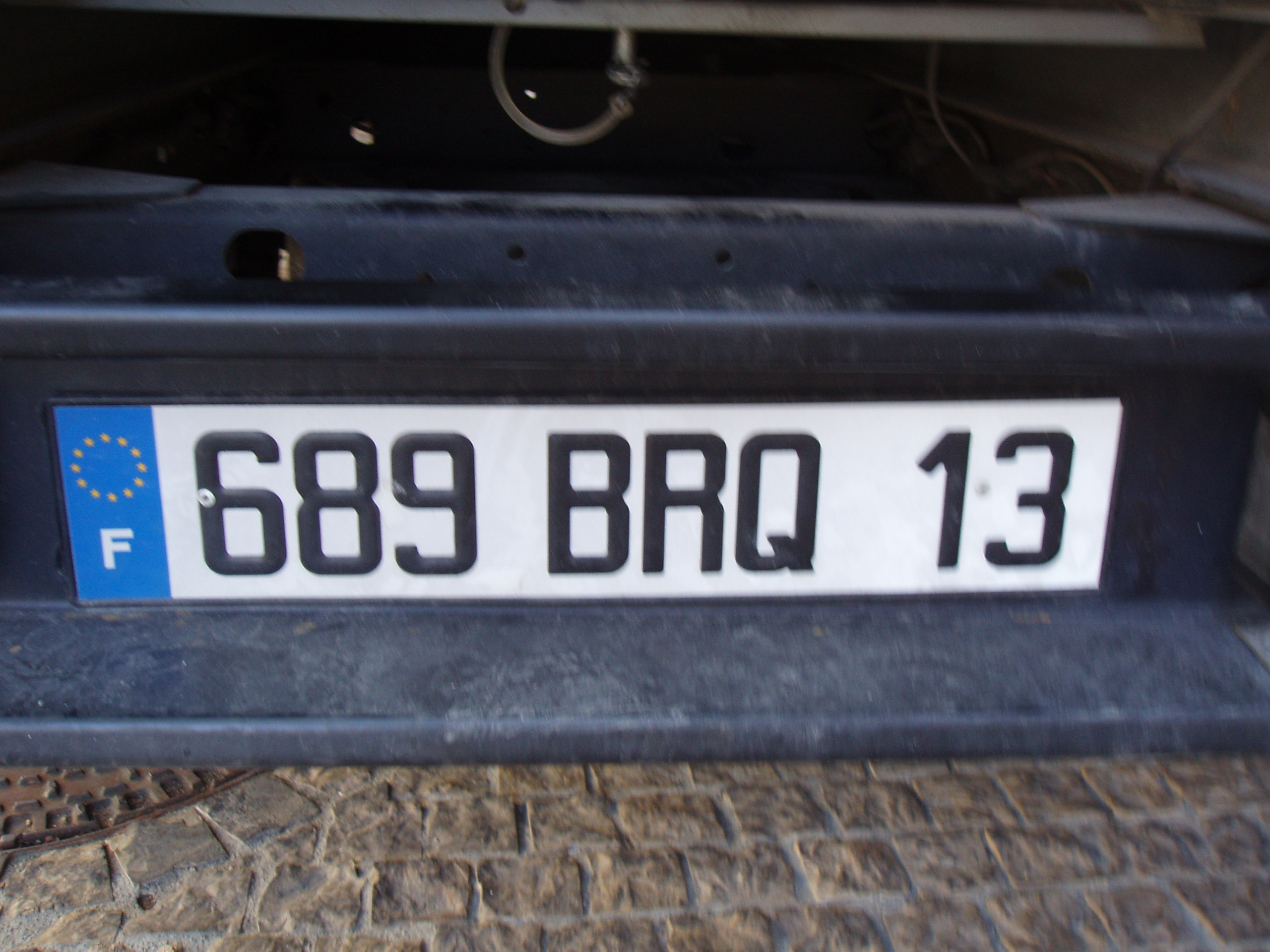 Plaque d´inmatriculation française